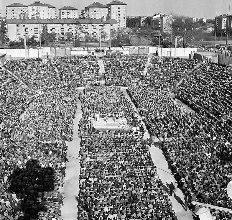 Johanneshovs Idrottsplats. EM i boxning. Ingemar ""Ingo"" Johansson försvarade sin EM-titel